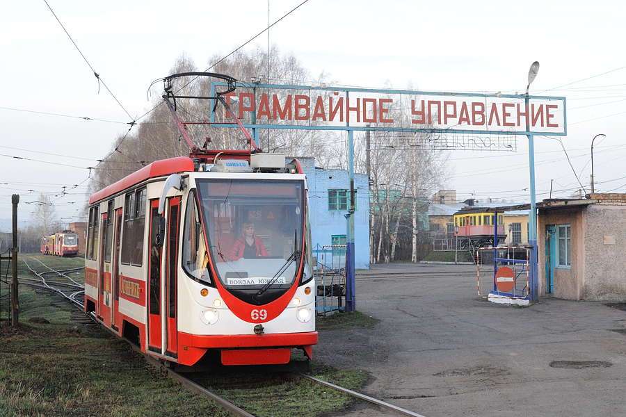 LM99AVN 69 in Ossinniki